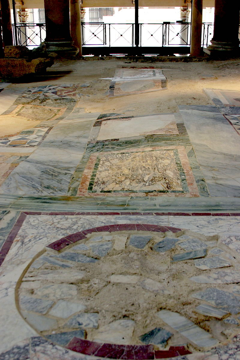 Villa Romana del Casale